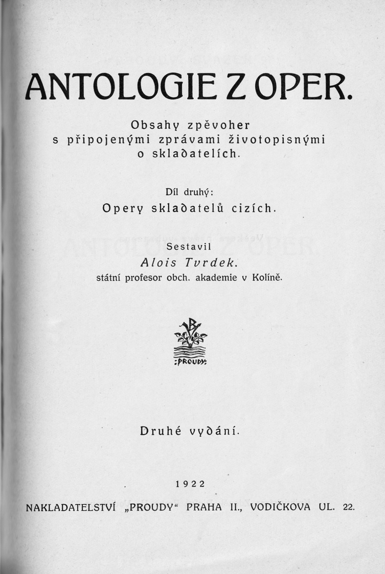 Antologie z oper. Obsahy zpěvoher s připojenými zprávami životopisnými o skladatelích. Díl druhý: Opery skladatelů cizích. Sestavil Alois Tvrdek. státní profesor obdch. akademie v Kolíně. Druhé vydání. 1922 Nakladatelství "Proudy" Praha II., Vodičkova ul. 22.